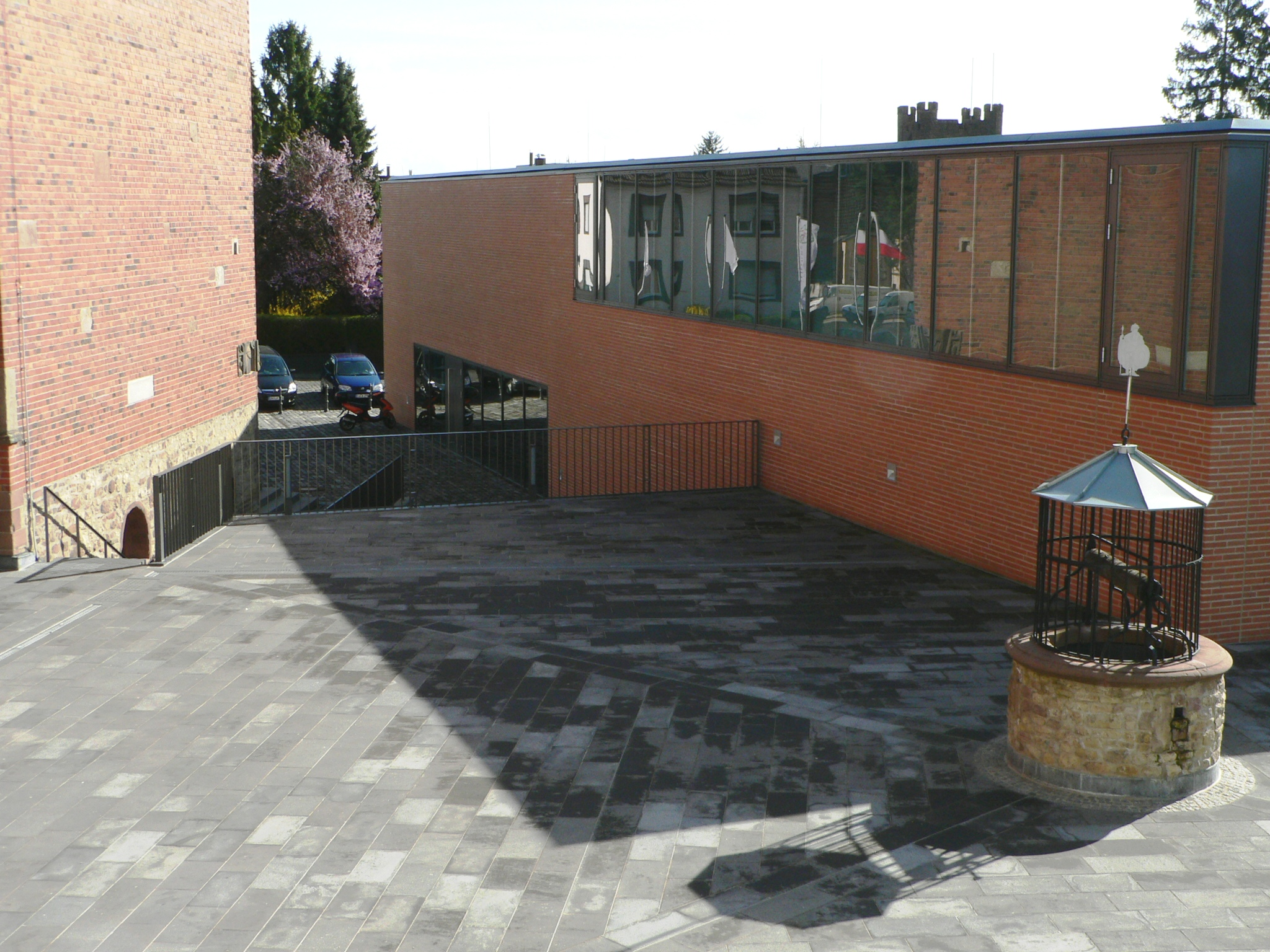 Blick auf den Quirinusplatz mit dem Brunnen, dahinter die "Römerthermen Zülpich - Museum der Badekultur"